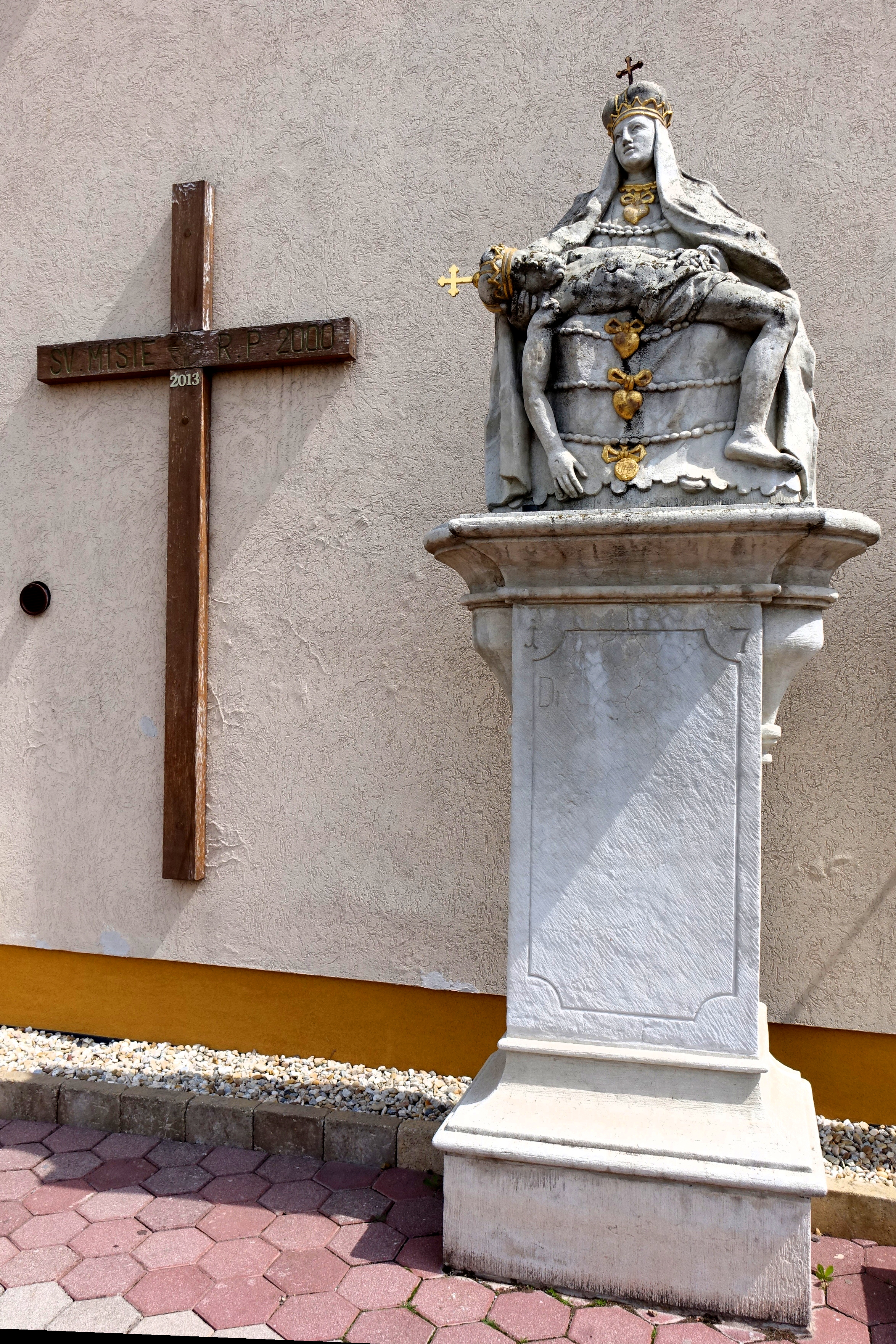 1.máj 2019. Detail. Rímskokatolícky kostol Nanebovzatia Panny Márie, mesto Sečovce, okres Trebišov. Slovensko.